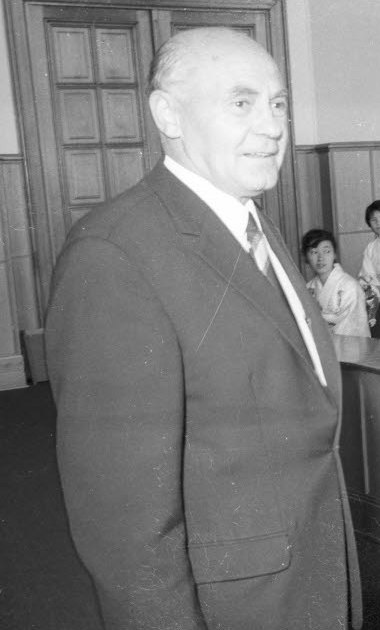 Im Parlamentssaal des Landeshauses überreicht Landtagsvizepräsident Gerhard Strack dem ehemaligen Oberbürgermeister von Tokio, Syojiro Takahashi, ein Gastgeschenk.